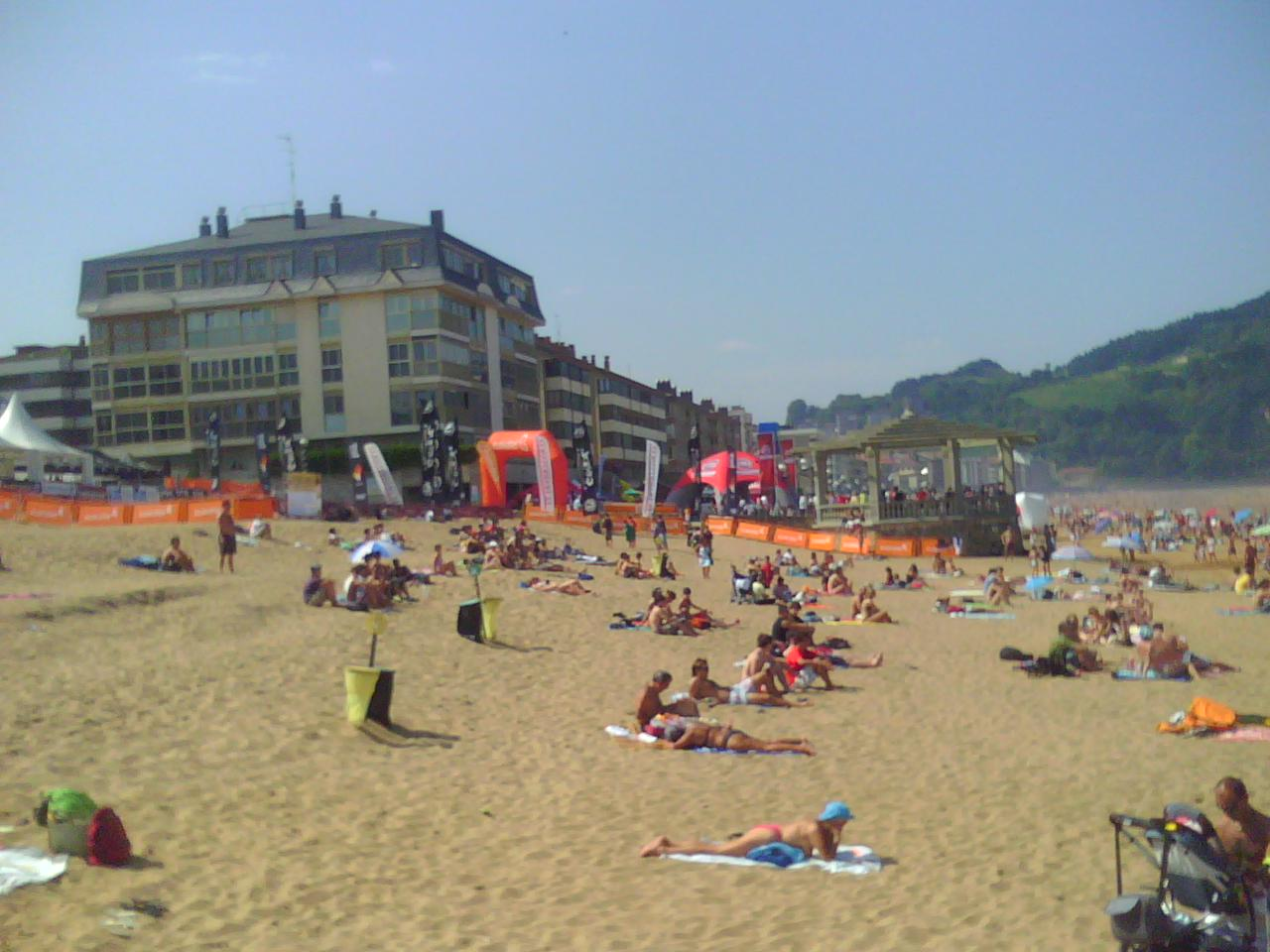 2007ko Pro Surf Zarautzeko denden gunea